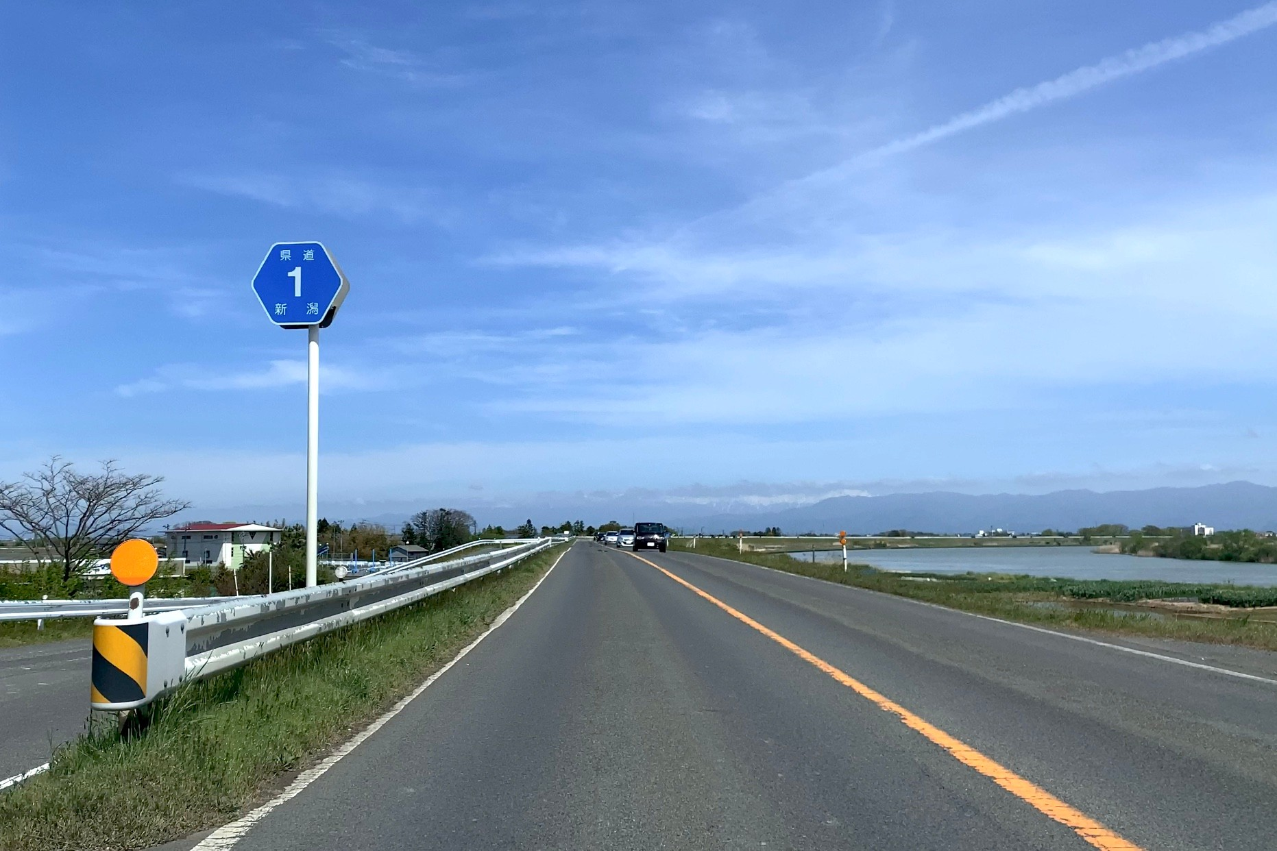 新潟県道1号新潟小須戸三条線 新潟市江南区舞潟付近（2020年5月）信濃川右岸の堤防上を走る。